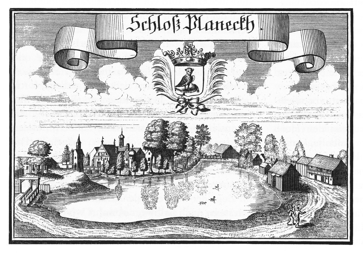 Schloss Planegg, Kupferstich von Michael Wening um 1700